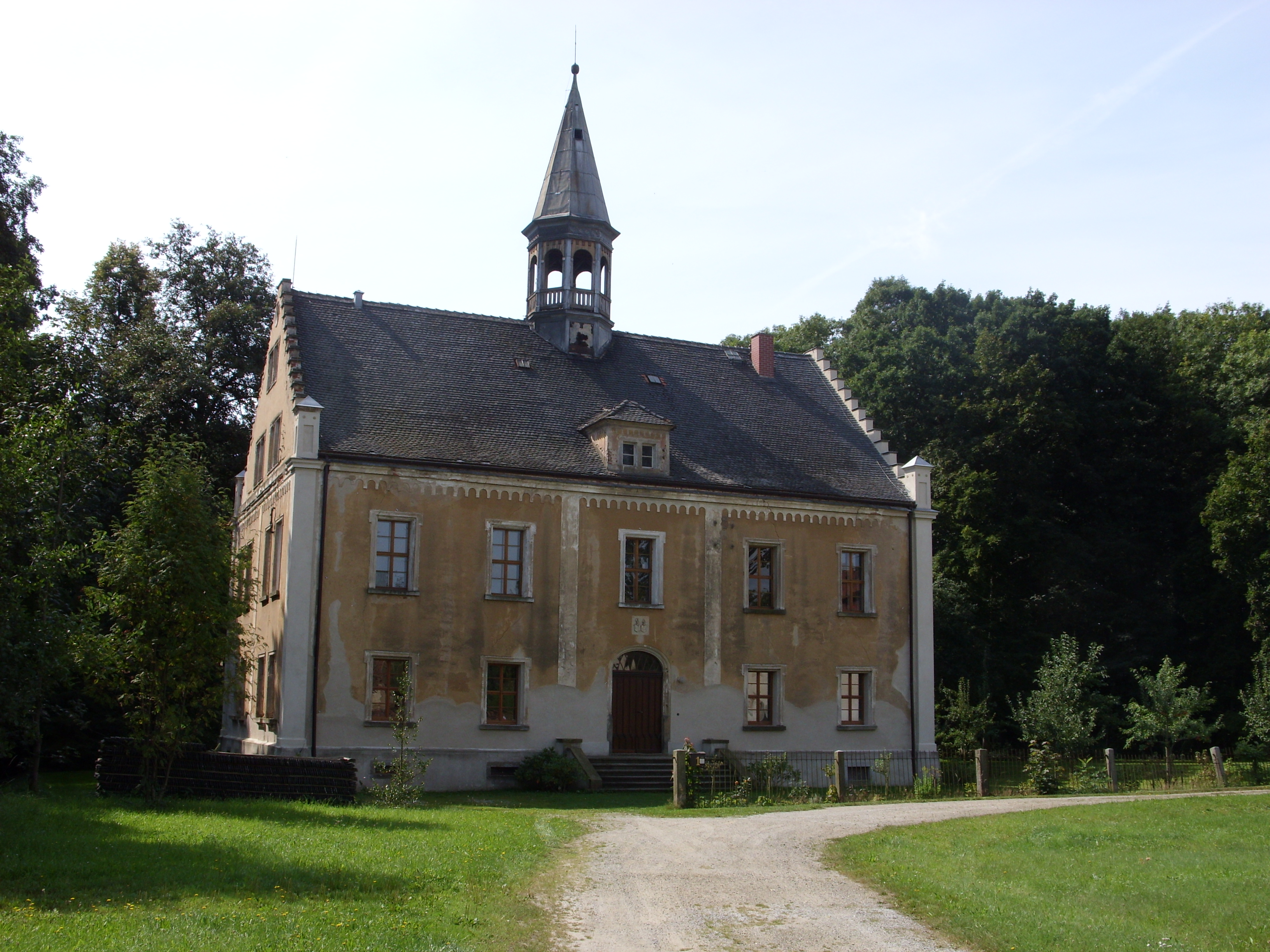 Das Weidlitzer Schloss, Landkreis Bautzen, Sachsen. Hornjoserbsce: Wutołčanski hród.